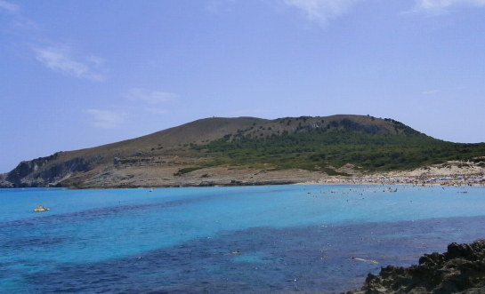 El Telegraf